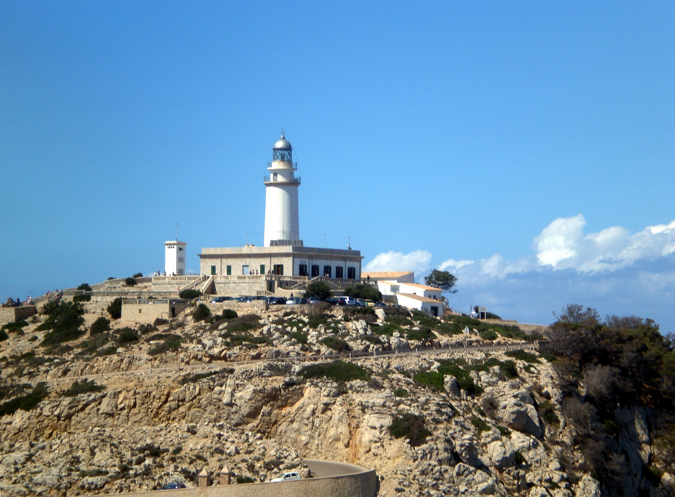 Maiorca Summary Brisckerly Opera propria Maiorca